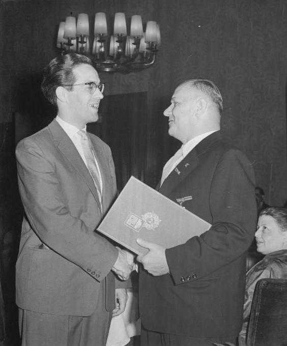 Zentralbild Quaschinski 7.6.1960 2. Arbeiterfestspiele des FDGB. Auszeichnung mit dem Kunst- und Literaturpreis 1960. Auf einem Empfang des Bundesvorstandes des FDGB wurde am 6.6.1960 die Verleihung des Kunst- und Literaturpreises des FDGB vom Stellvertreter des Vorsitzenden des FDGB, Walter Buchheim, vorgenommen. UBz: Walter Buchheim (rechts) überreicht Hans-Jürgen Steinmann den Literaturpreis des FDGB 1960 für seinen Roman "Die größere Liebe".